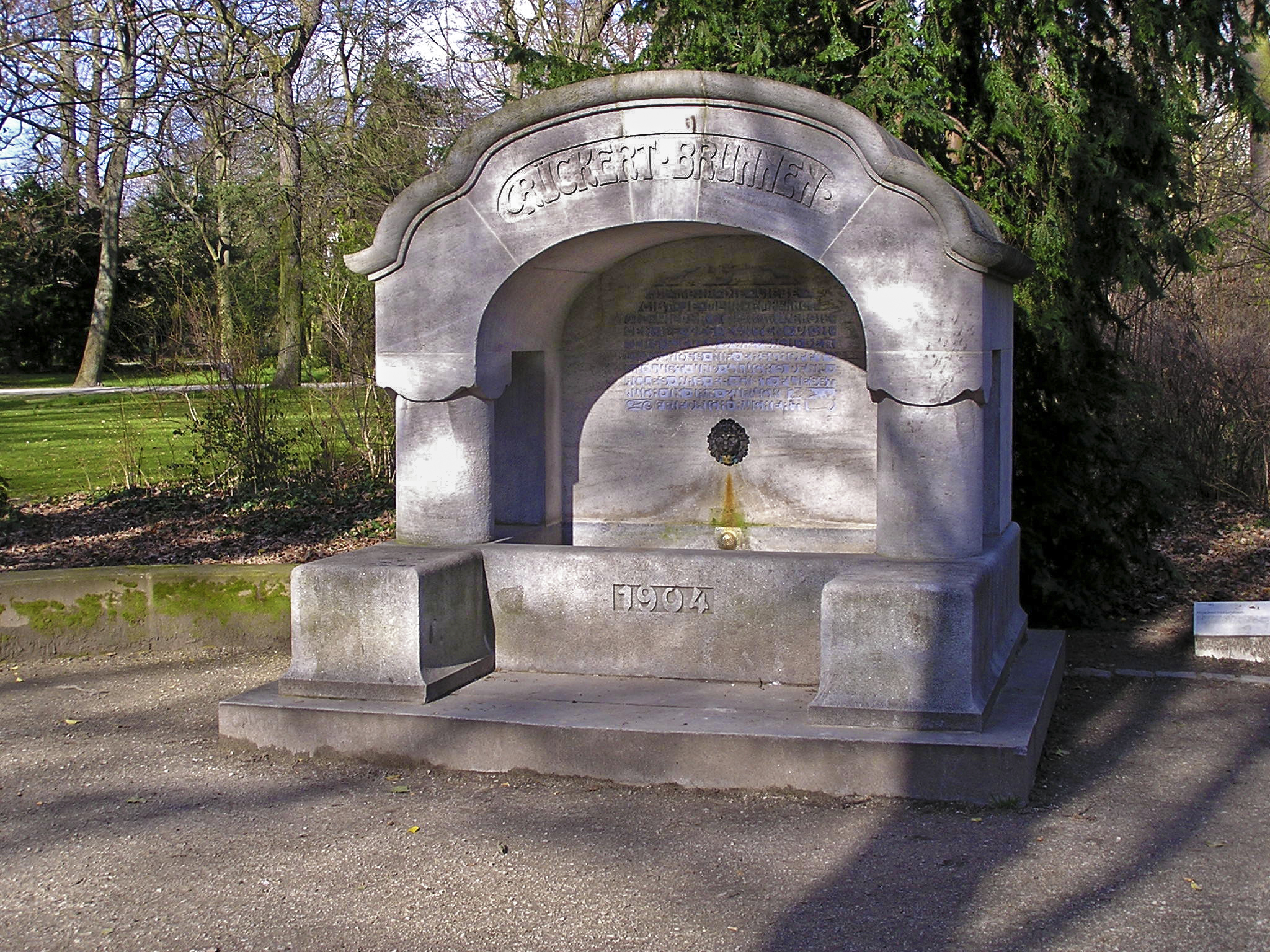 Rückertbrunnen im Erlanger Schlossgarten